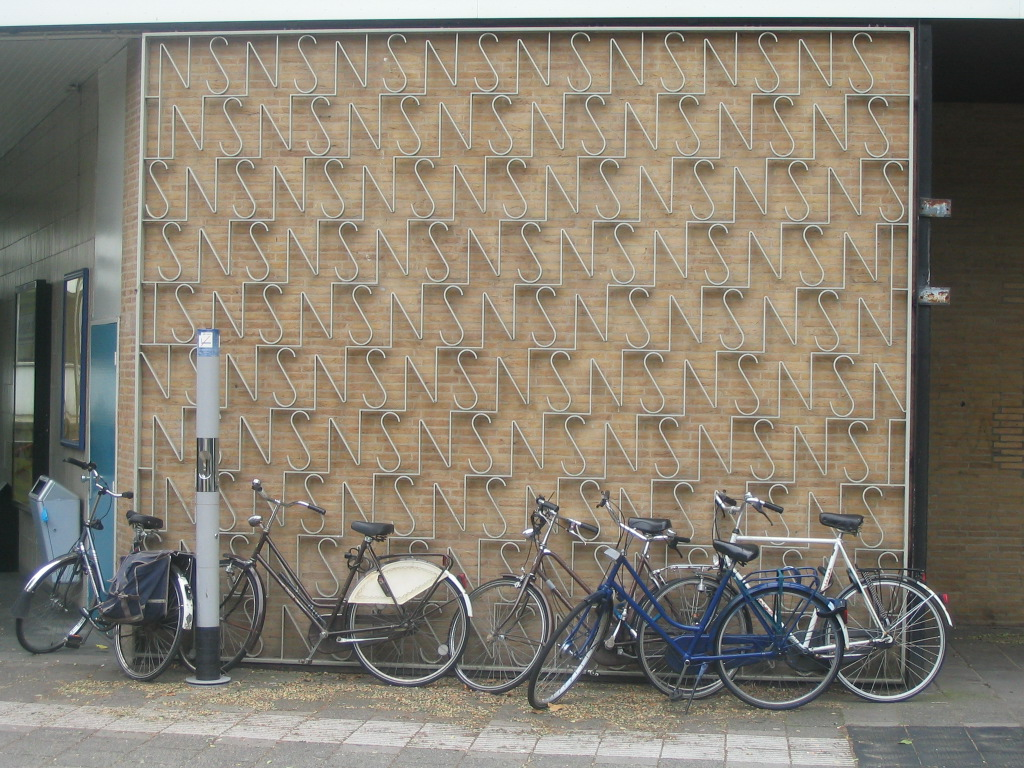 Kunstwerk op station Driebergen-Zeist.